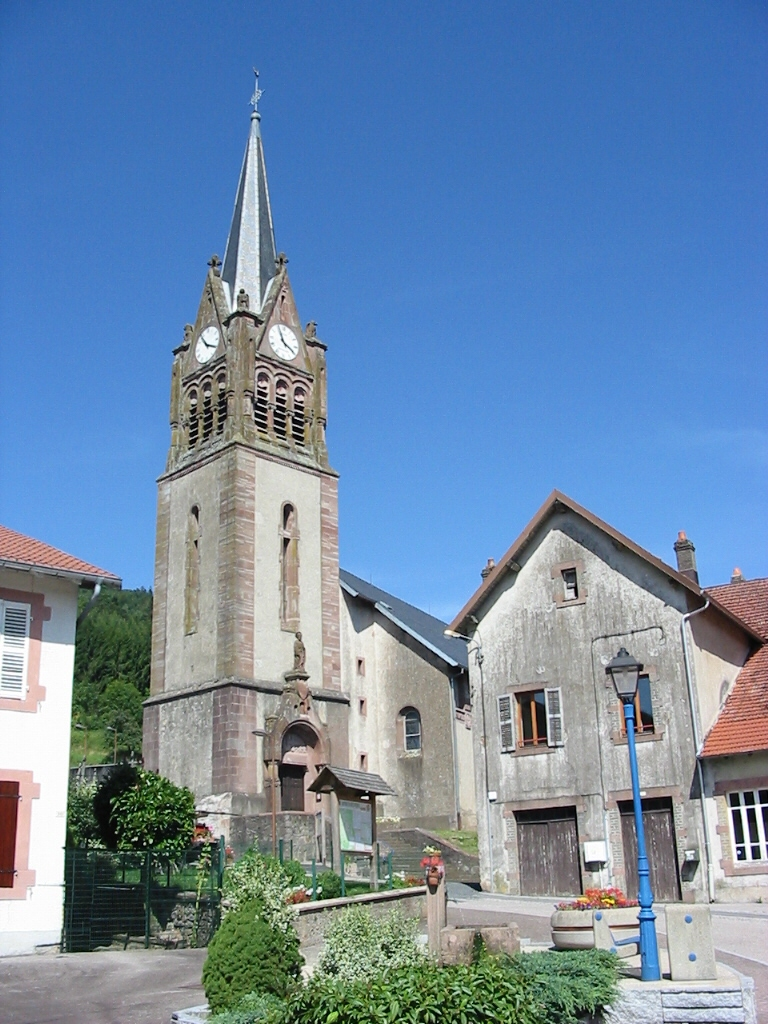 Wisembach, comme du département des Vosges. Église Saint-Barthélemy, érigée en 1782.